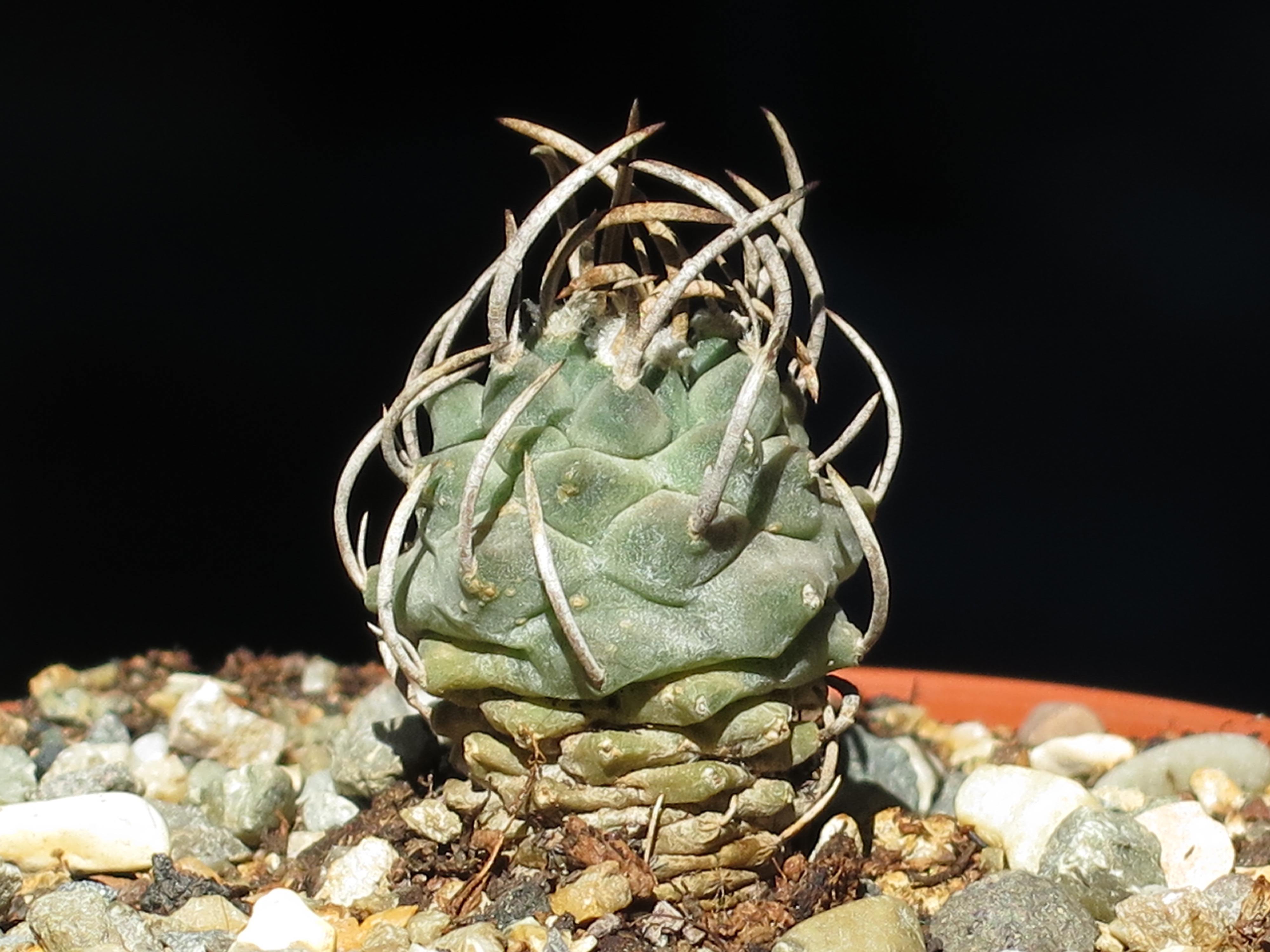 Una piccola pianta di turbinicarpus schmiedickeanus subsp. schwarzii SB269 (Matehuala, San Luis Potosi)